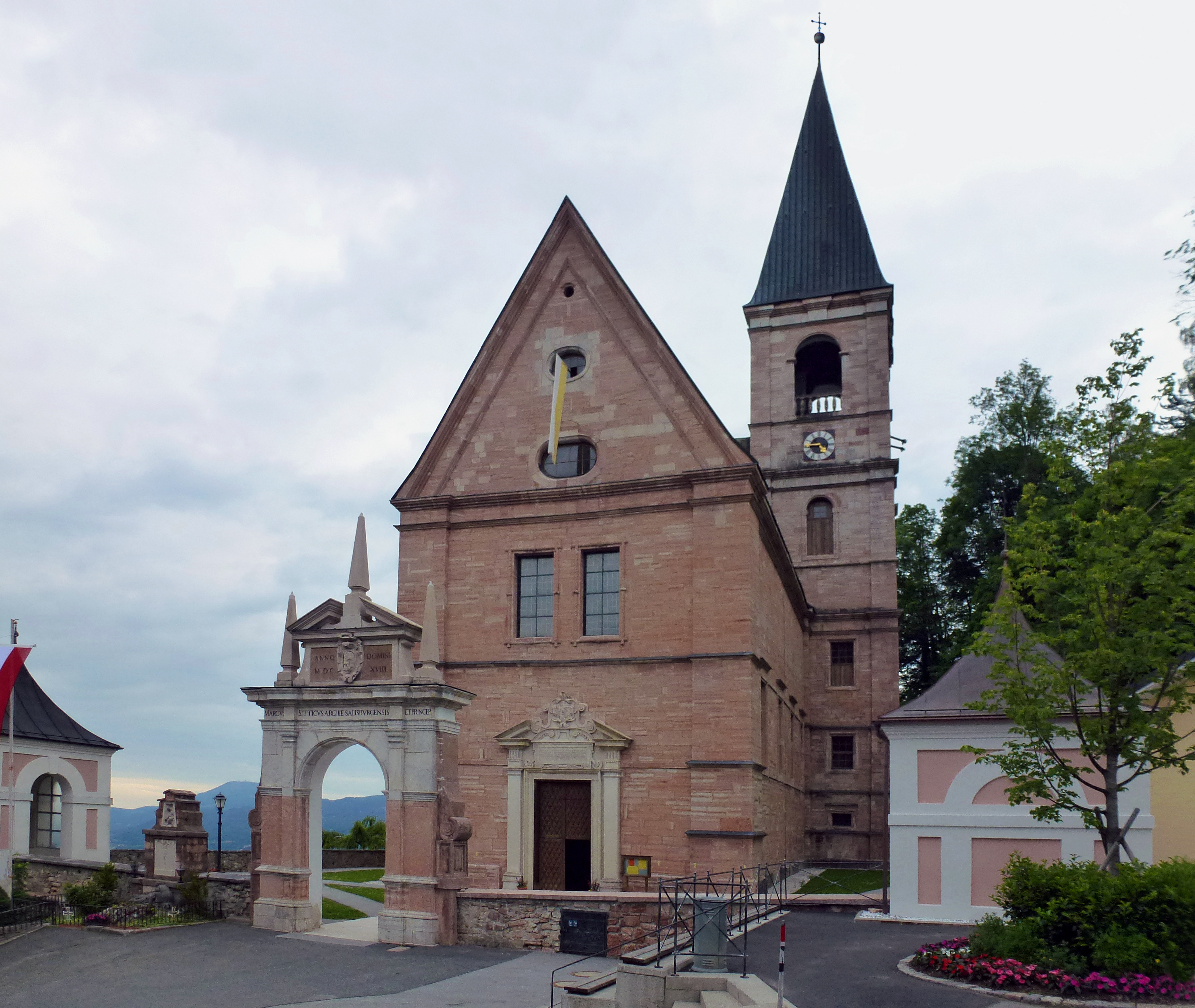 Pfarr- und Wallfahrtskirche Mariä Himmelfahrt - Rupertusplatz, Bad Dürnberg (Hallein)